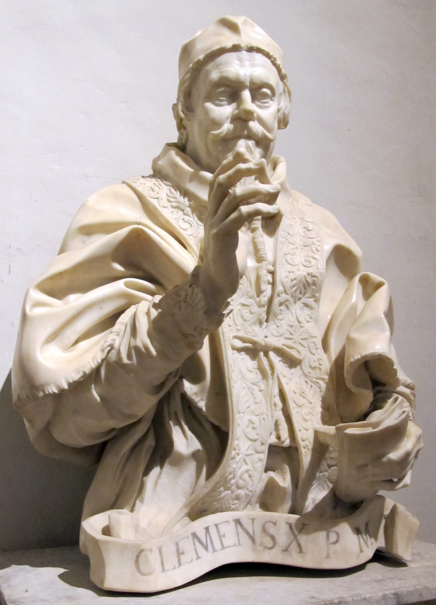 Gianlorenzo bernini, busto di Clemente X